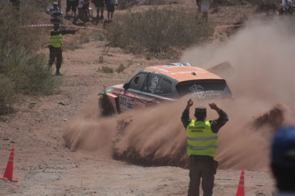 Rally Dakar 2009, etapa 4 Jacobacci Neuquén. N. Al Attiyah (Qatar) / Thorner (Suecia) - BMW